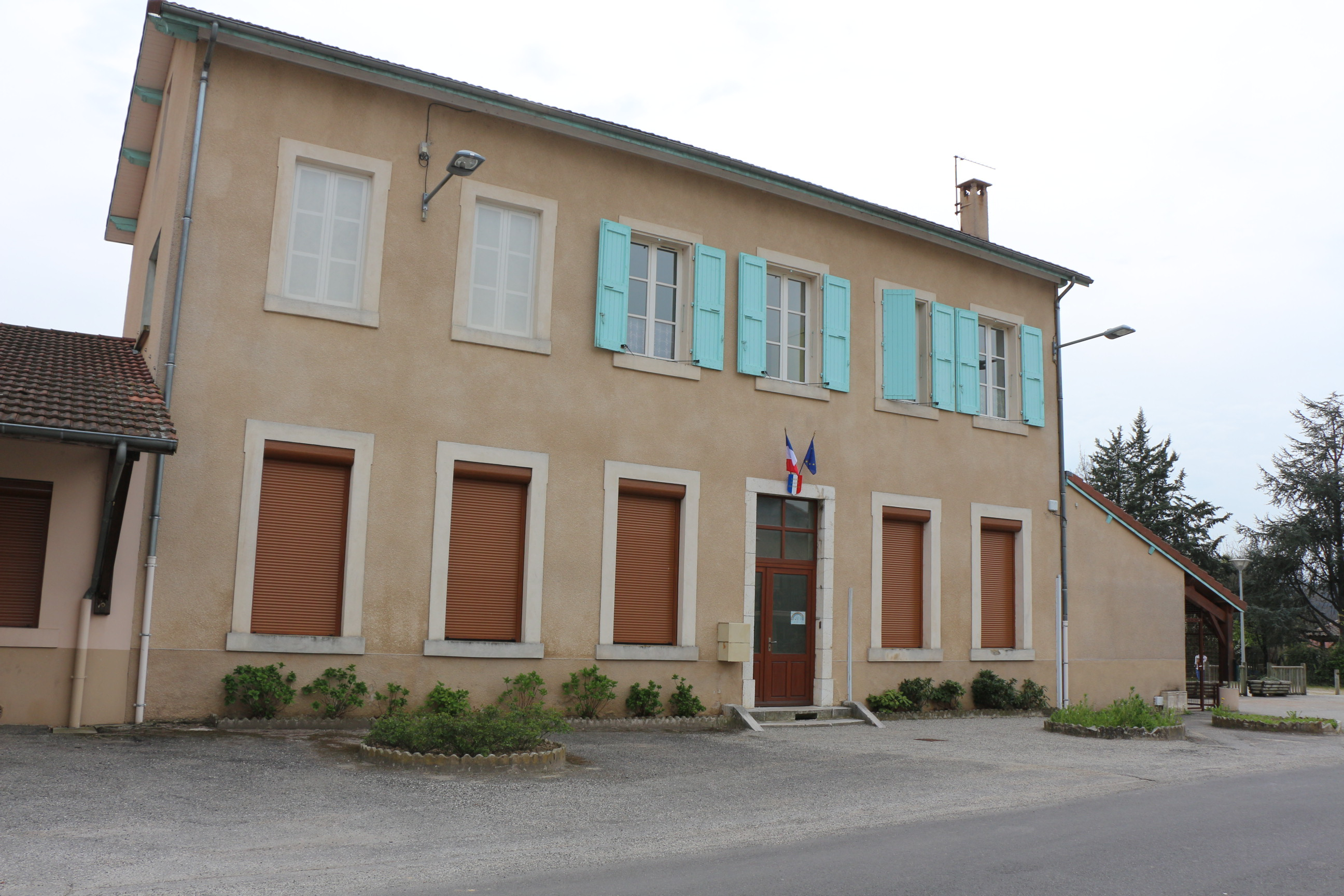 Ecole primaire composée de deux classes